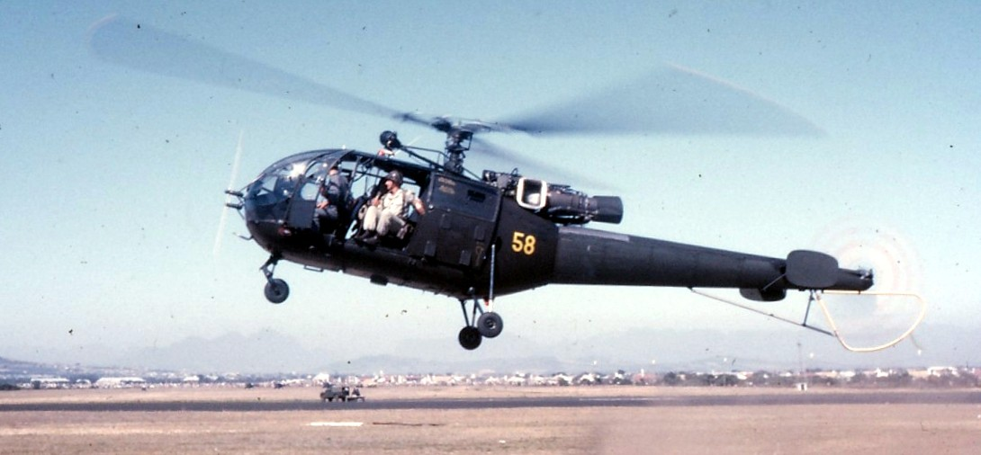 Alouette III no. 58 at AFB Ysterplaat during SAAF 50